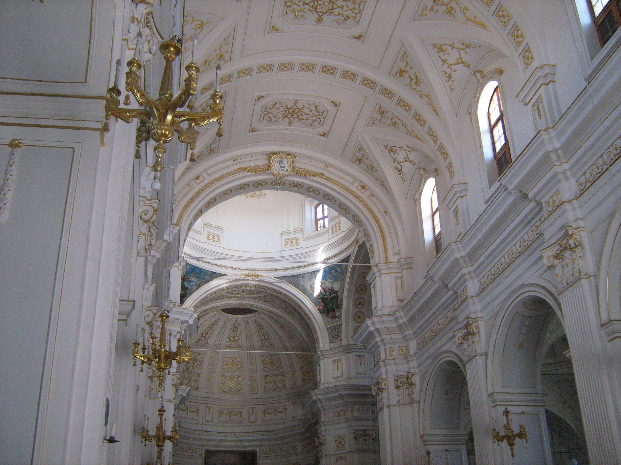 Chiesa Madre di Gela, interni Licensing Categoria:Gela